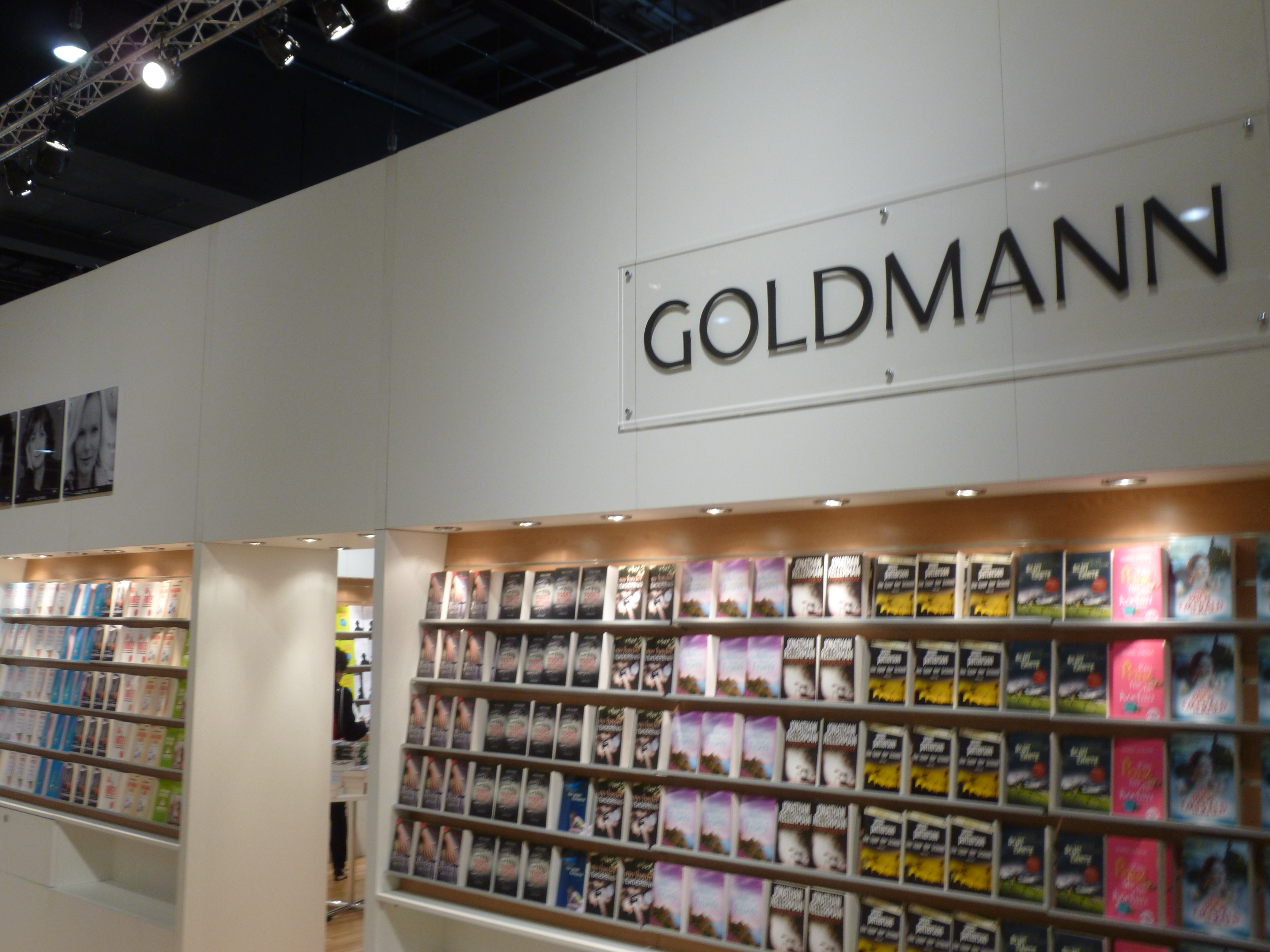 stando de la eldonejo Goldmann en la Frankfurta librofoiro 2012